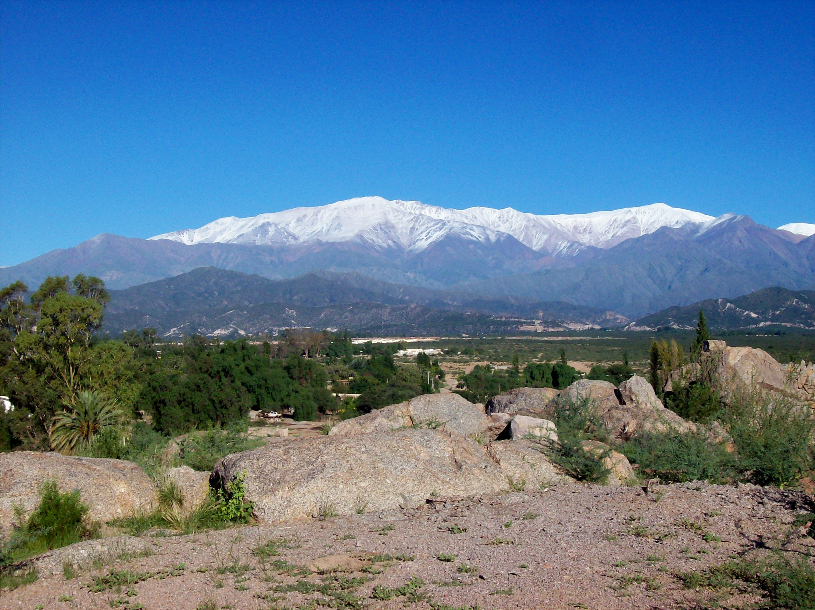 Vista de la Sierra de Famatina desde Chilecito, en la provincia argentina de La Rioja. La foto está tomada desde un mirador del cerro Paimán, sobre la entrada de la ruta 40, en el extremo NO de ese cerro, frente a la "Gruta de Santa Rita". La dirección de la toma es hacia el Oeste en paralelo a la calle Niño Alcalde.